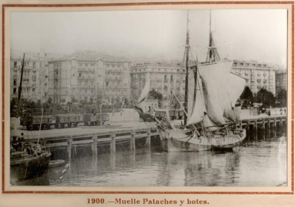 Um barco a velas do tipo "patacho", em 1900; caracterizada por possuir dois mastros, bastante ligeira e de pequeno calado. Este tipo de embarcação, de origem ibérica, teve largo uso no Brasil até começo do séc. XX.